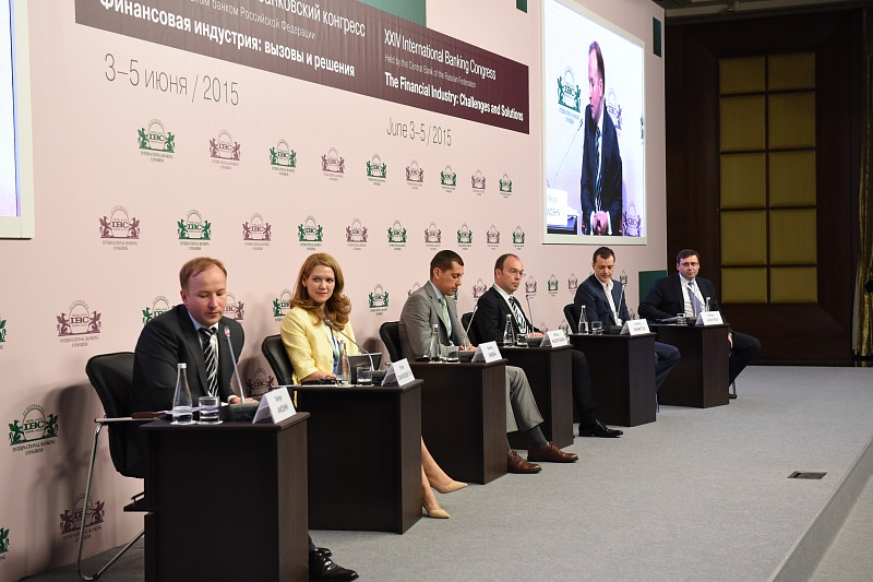 МБК-2015